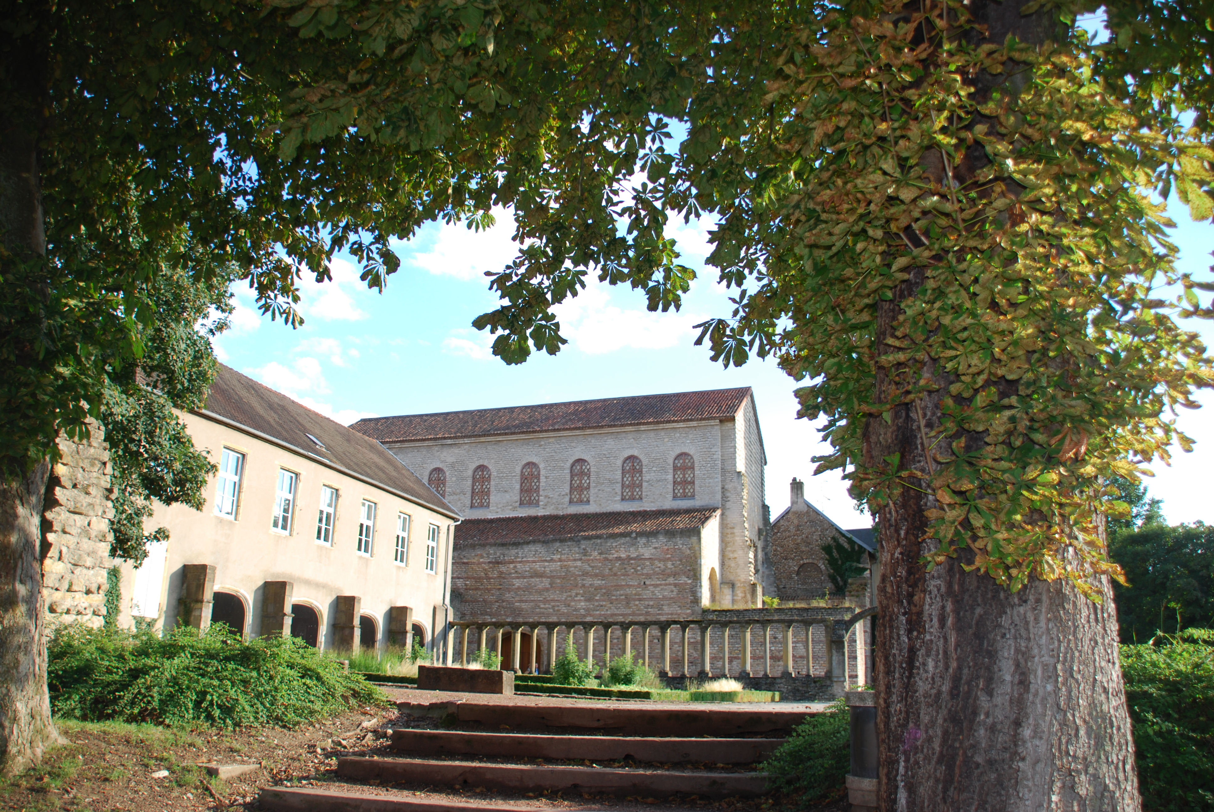 Kirche Saint-Pierre-aux-Nonnains in Metz